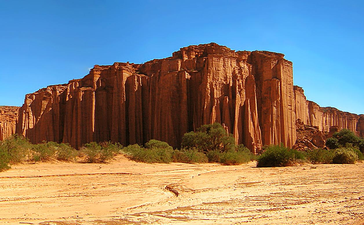 Talampaya